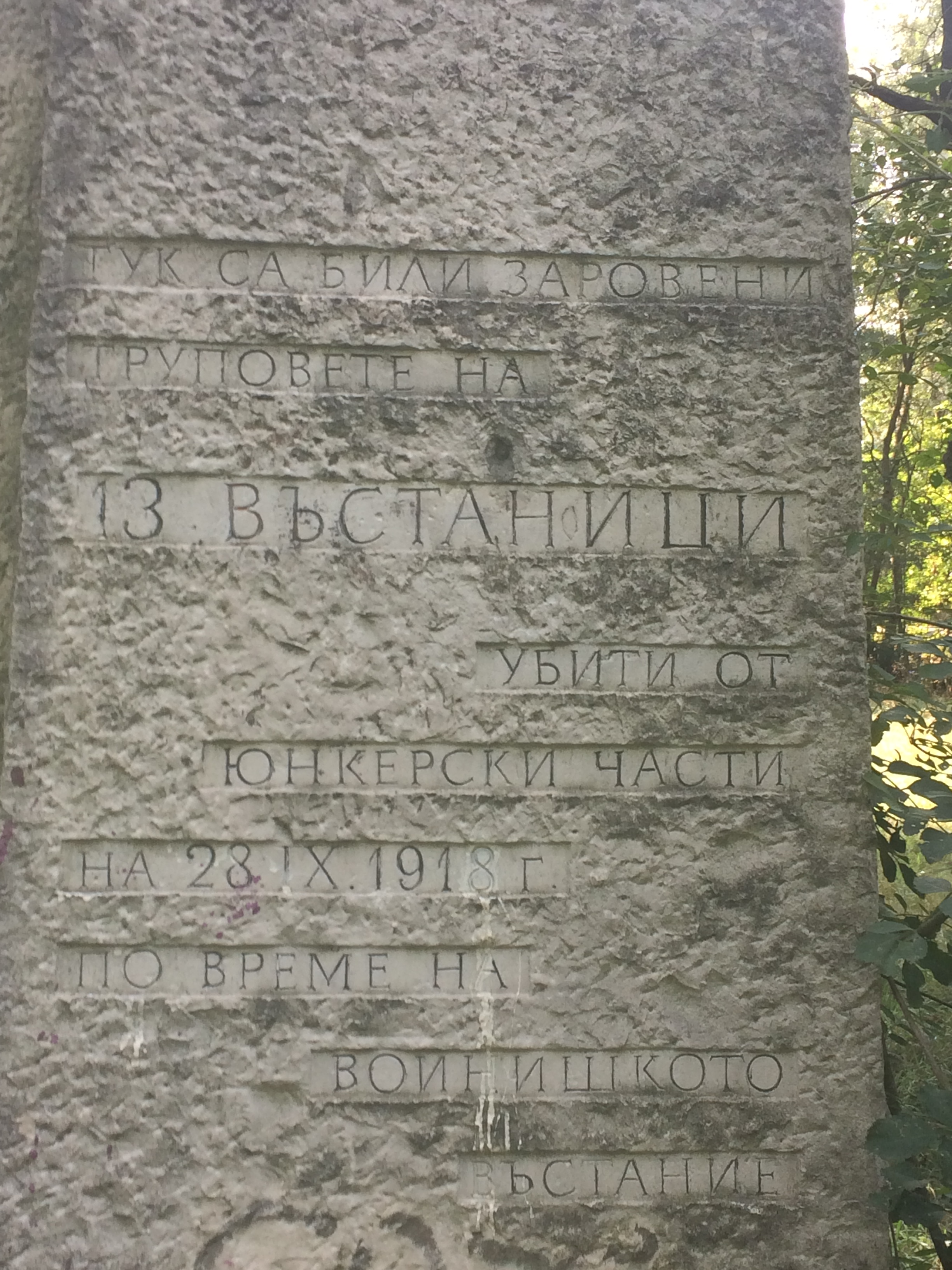 Паметник на 13 въстаници от Владайското въстание в Западния парк (край Захарна фабрика), София